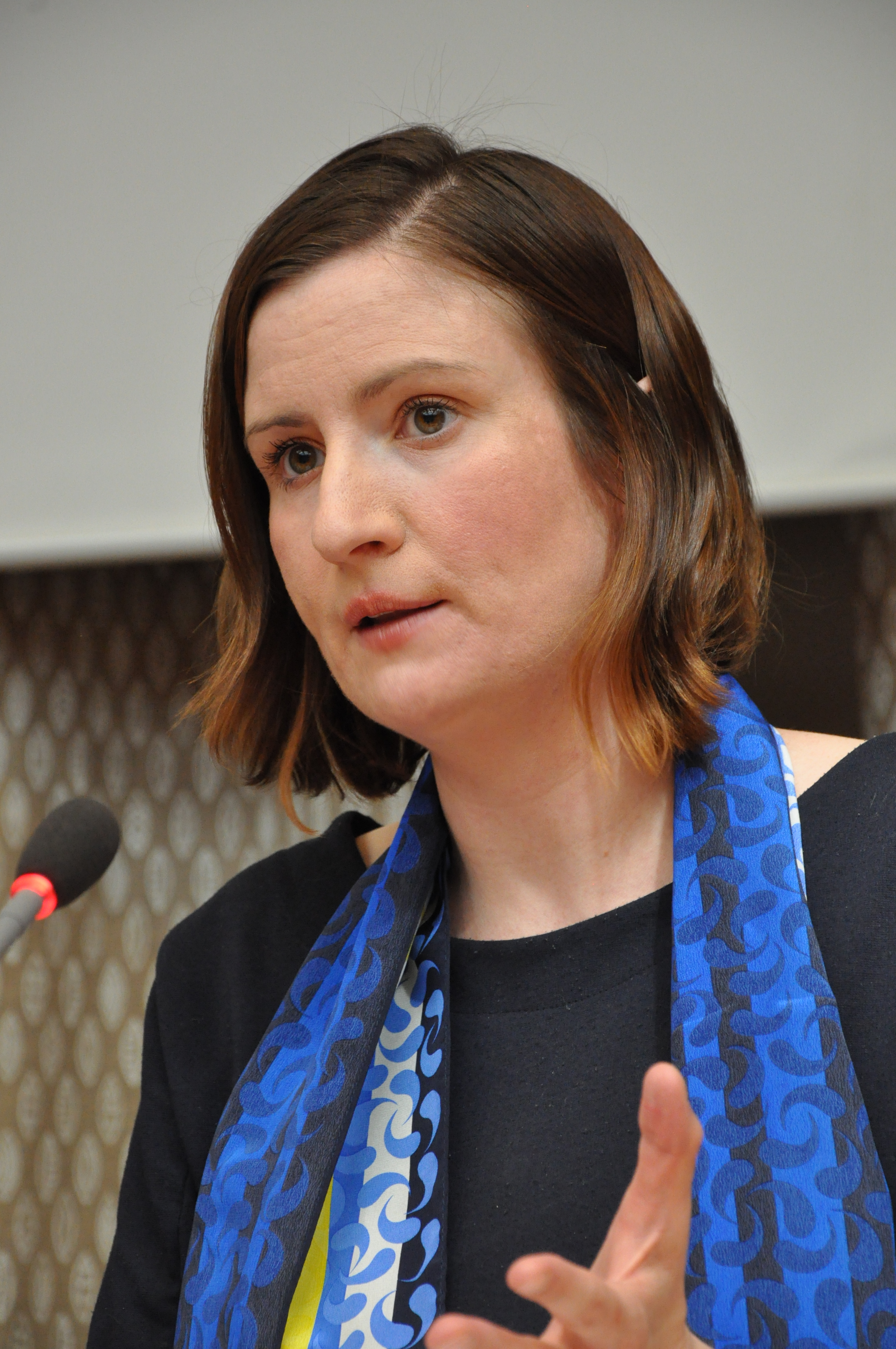 debatt om eu i ABF-huset